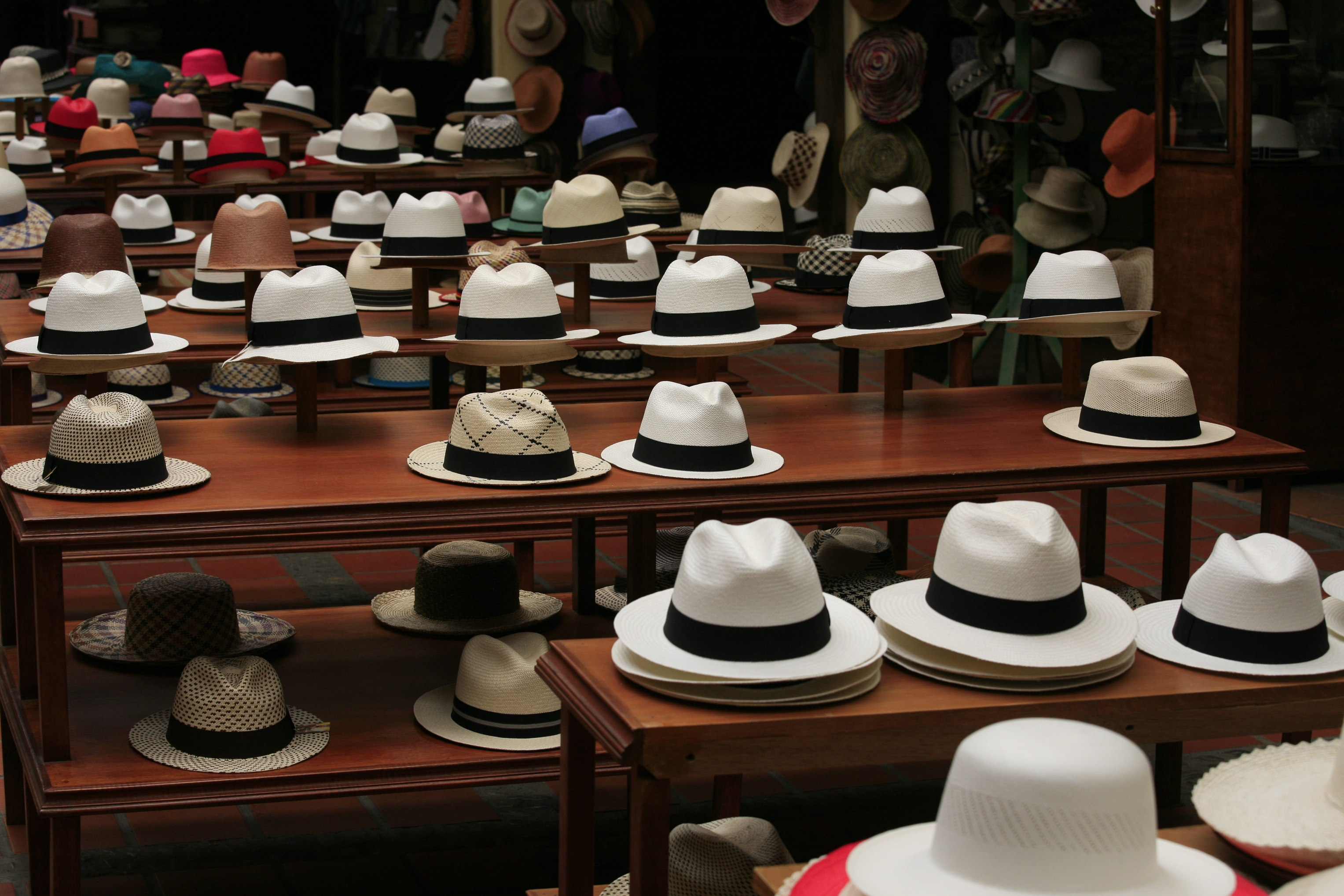 Cuenca, Ecuador